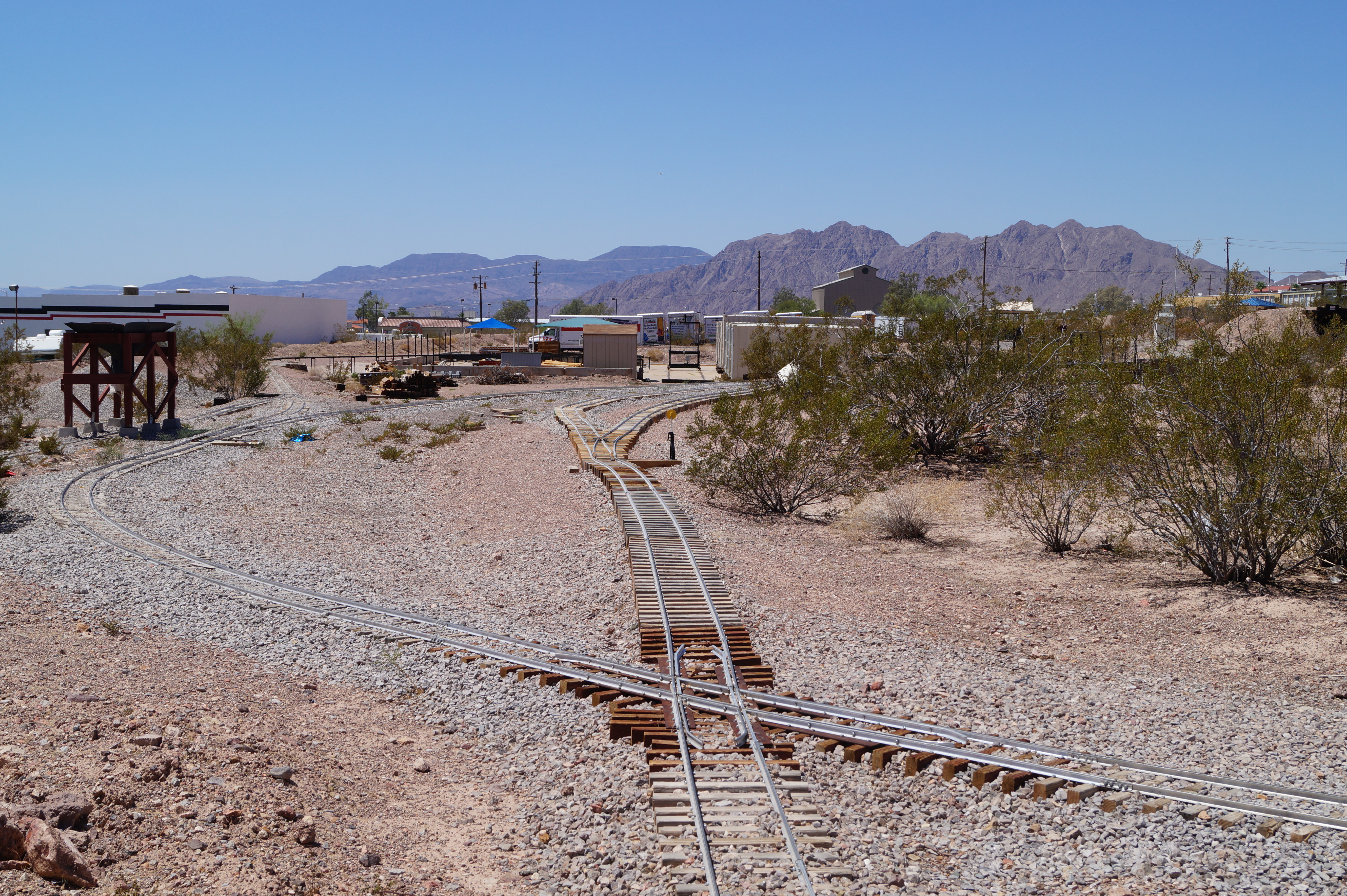 The Nevada State Railroad Museum which is an agency of the Nevada Department of Cultural Affairs. It is located at Yucca Street on the tracks of the historic Union Pacific Railroad branch Henderson-Boulder City near the former Boulder City Railroad Yards where the Hoover Dam construction equipment was unloaded in the 1930s.